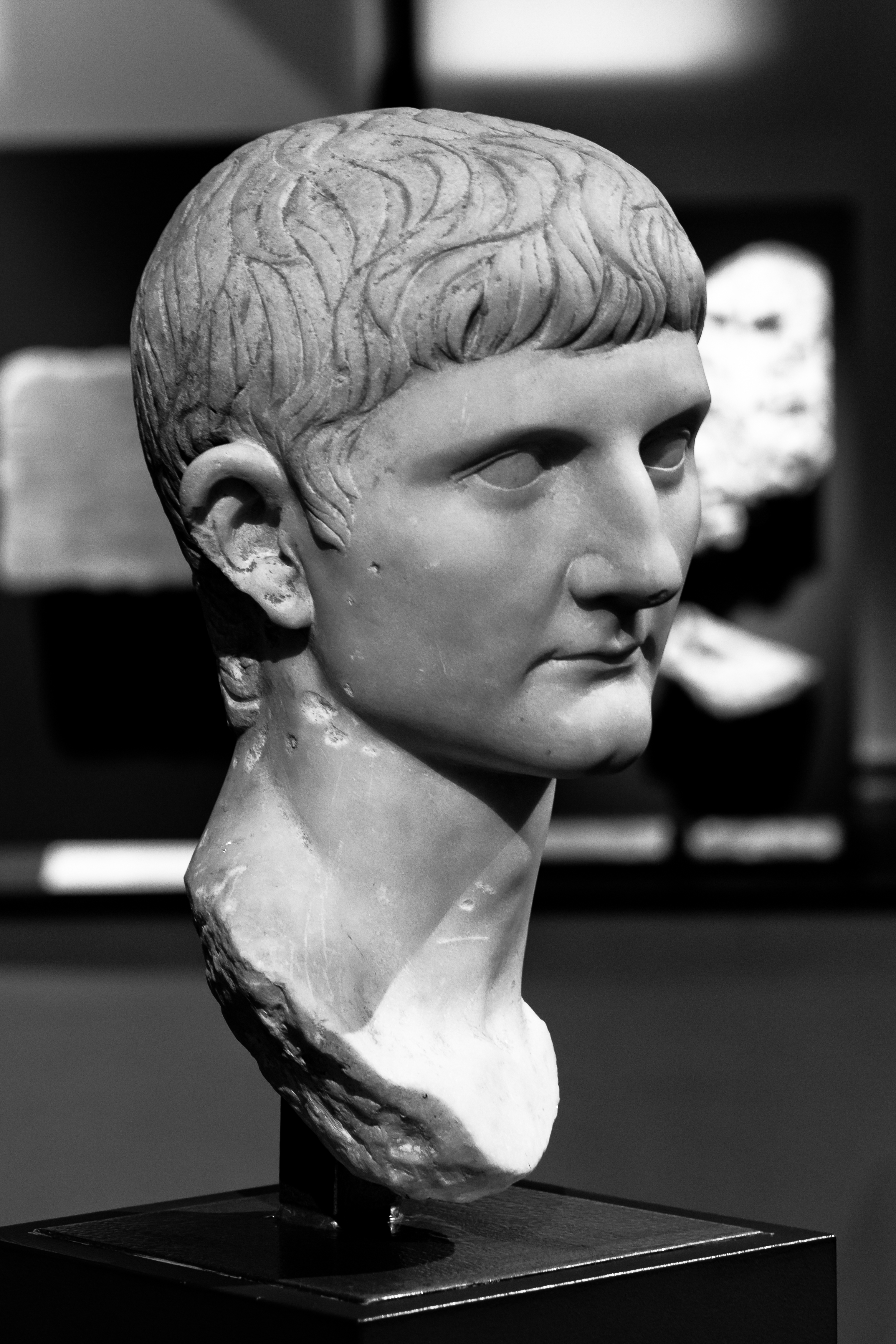 Germanicus, fils de Drusus l'ancien et d'Antonia minor